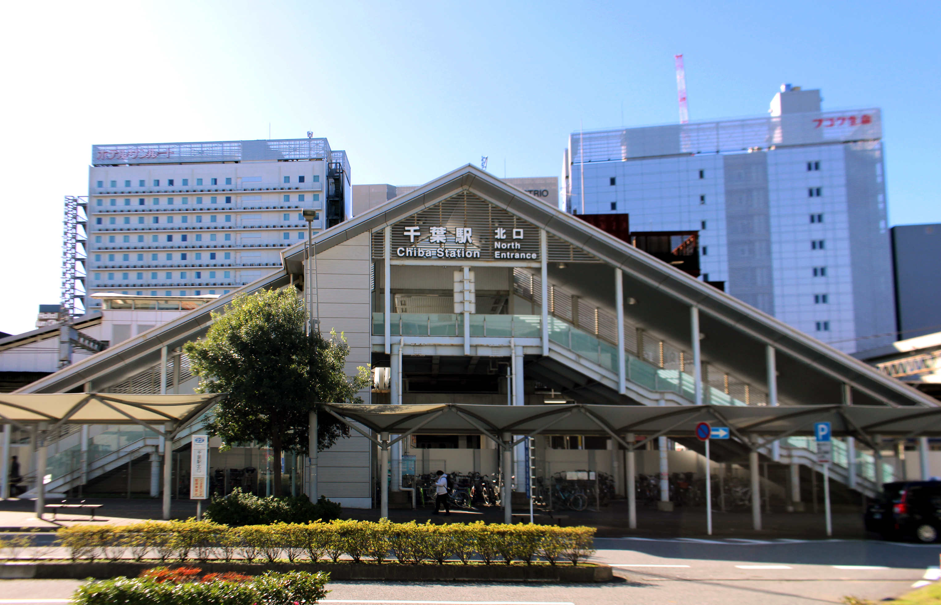 千葉駅北口 正面